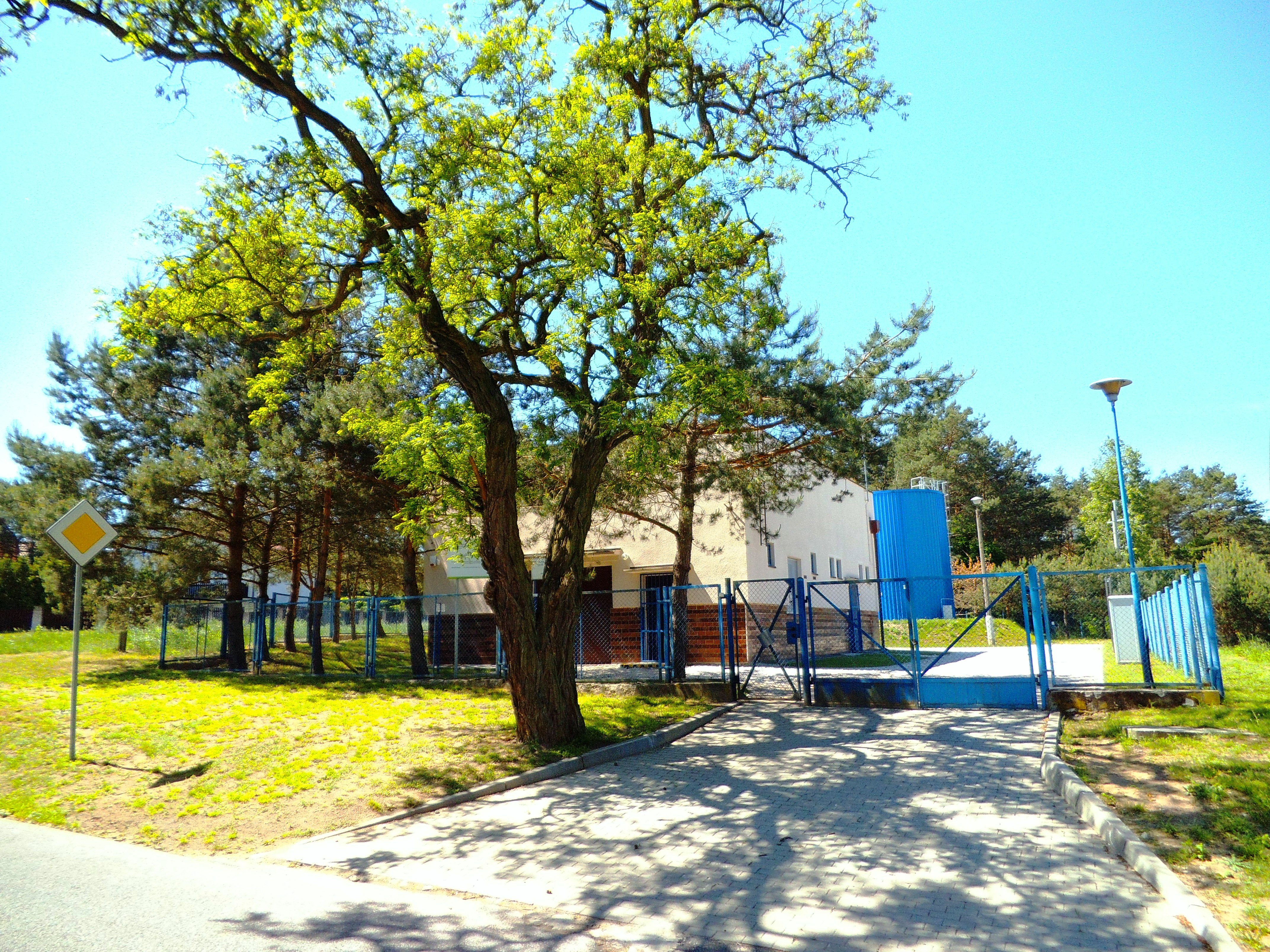 Toruńskie Wodociągi1